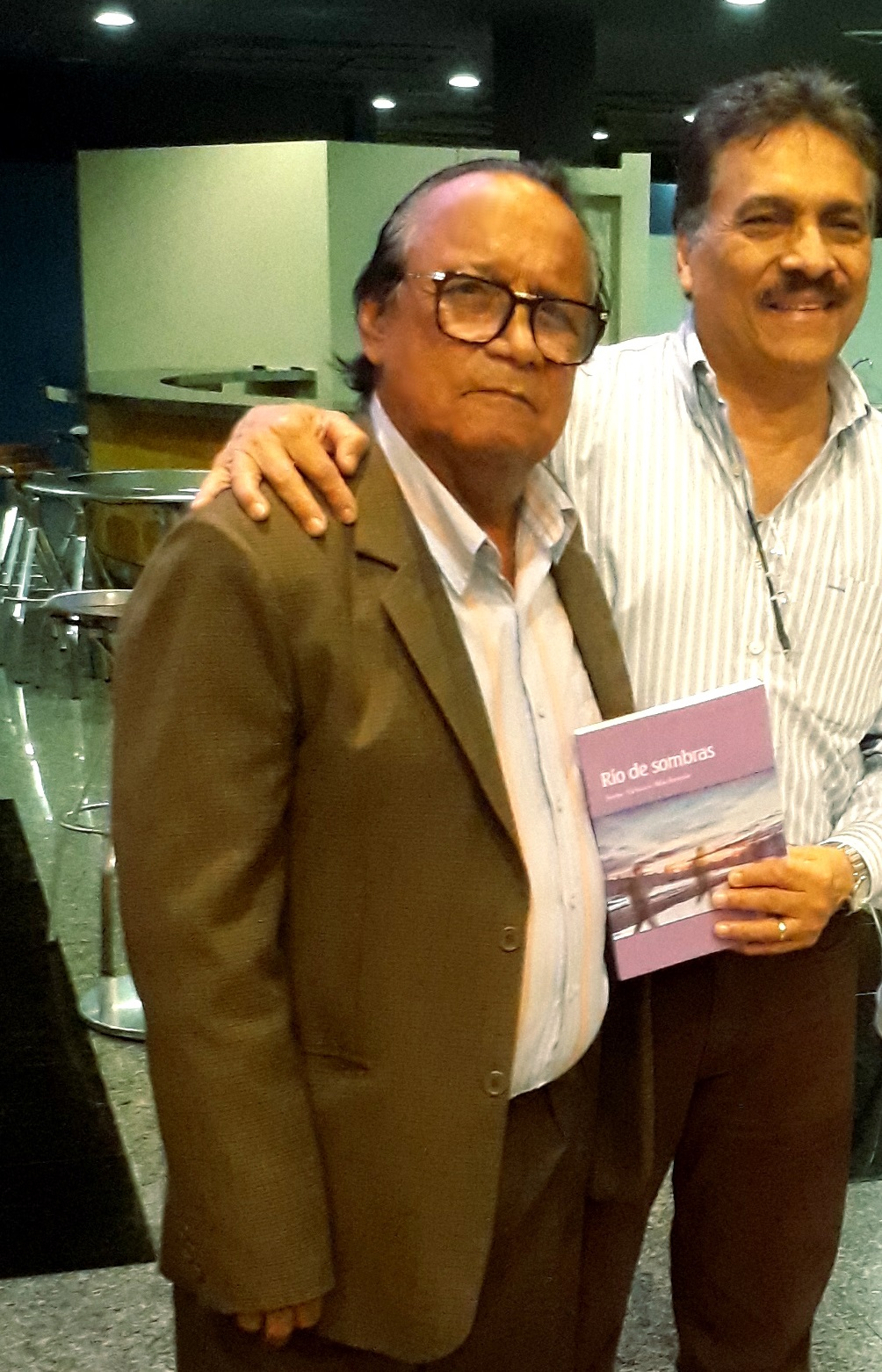 Jorge Velasco Mackenzie en "A vuelo de página"